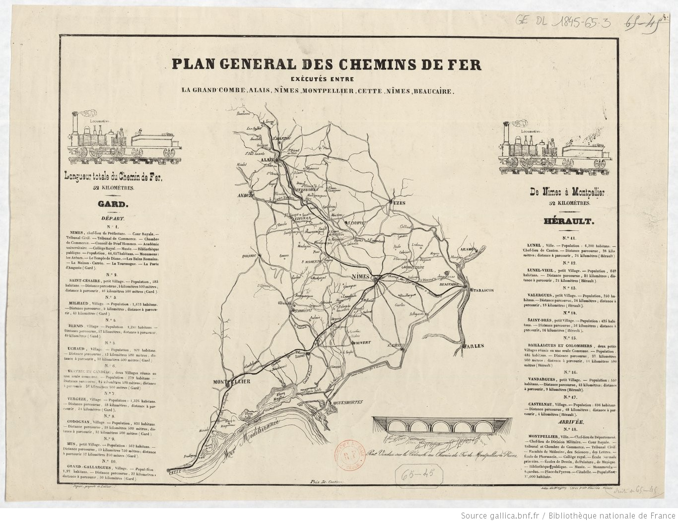 Plan général des chemins de fer exécutés entre La Grand Combe, Alais, Nîmes, Montpellier, Cette, Nîmes, Beaucaire. Avec la liste des station dans les départements du Gard et de l'Hérault.